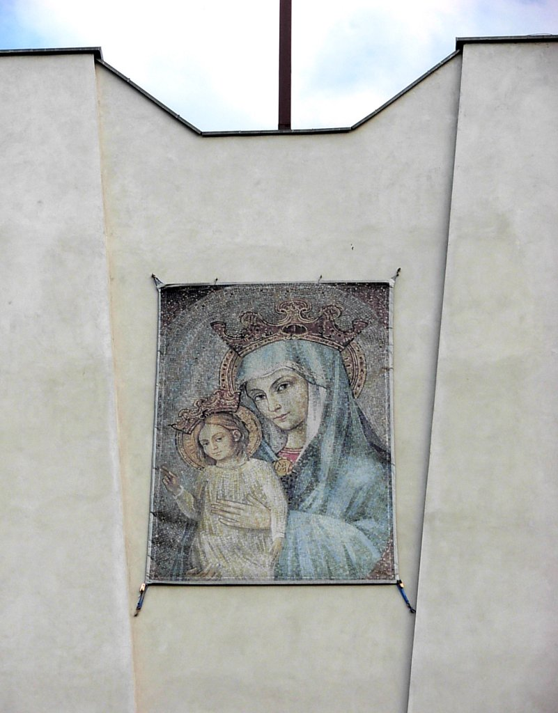 Kościół NMP Matki Kościoła w Bydgoszczy na Górzyskowie